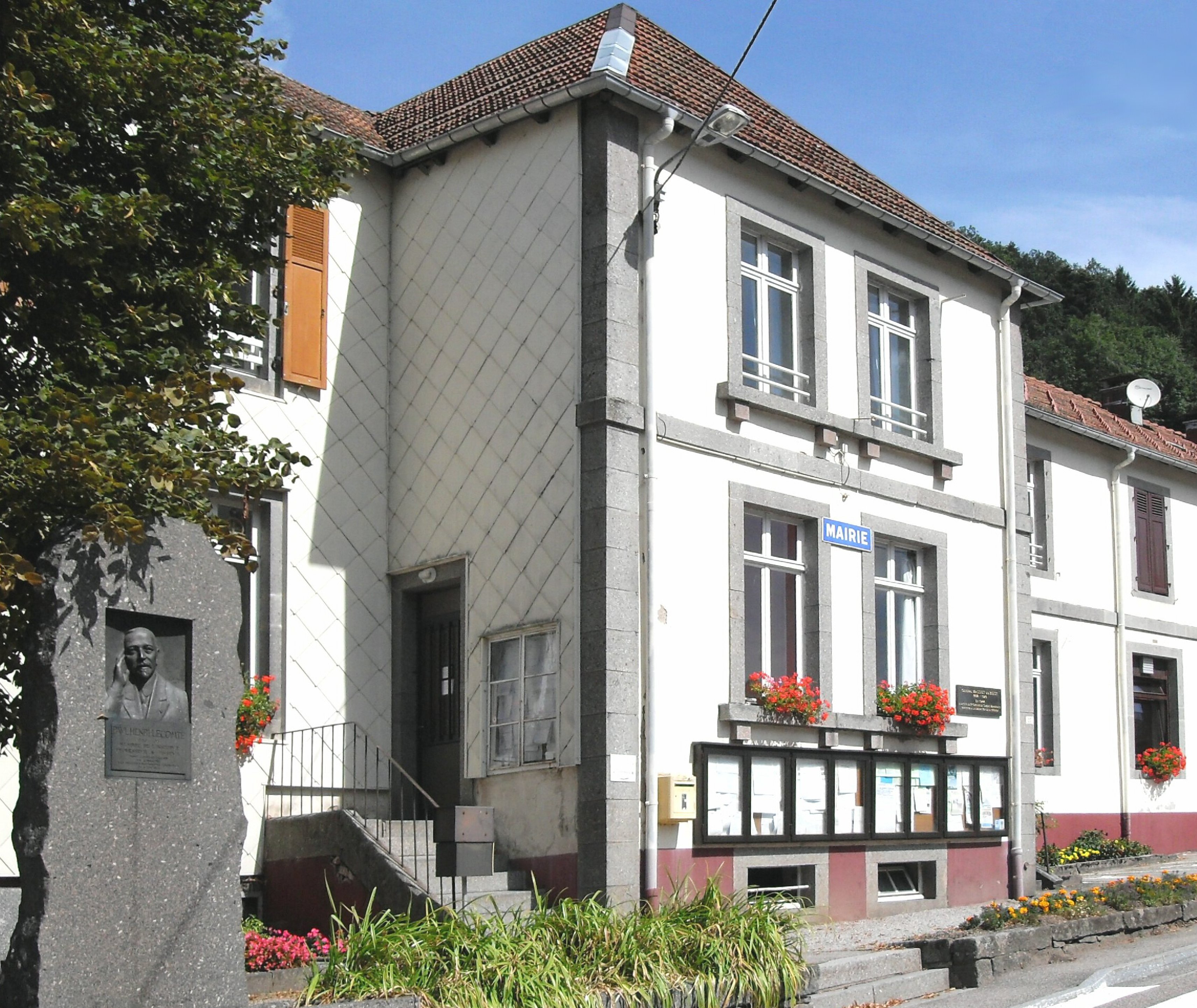 La mairie de Basse-sur-le-Rupt